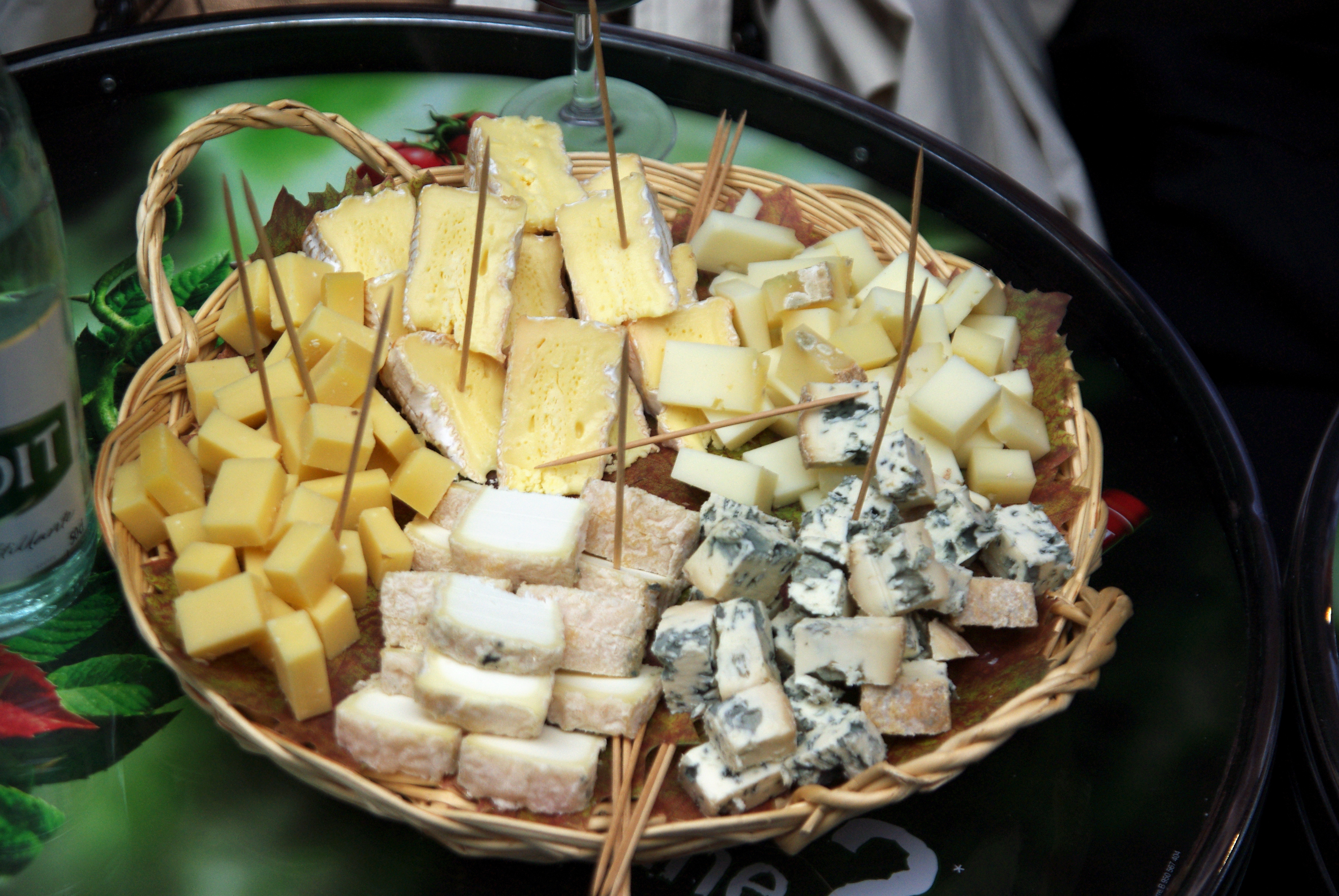 Cheese, cheese, and cheese!